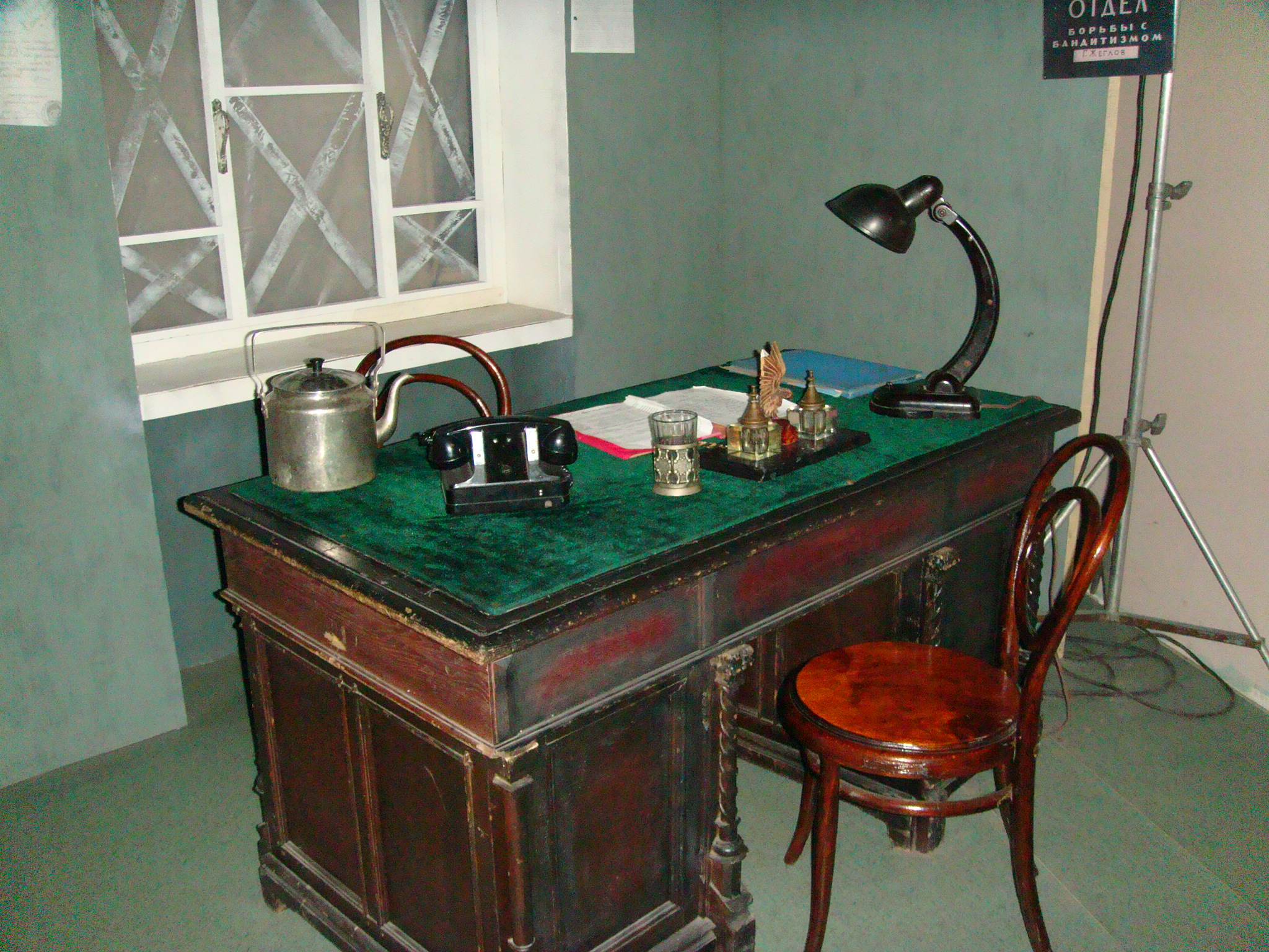 Одесский музей кино. Предметы быта на столе Жеголова, записки, документы + камера и осветительная техника, которые принимали участие в съемках фильма "Место встречи изменить нельзя". Съёмочный павильон №5.